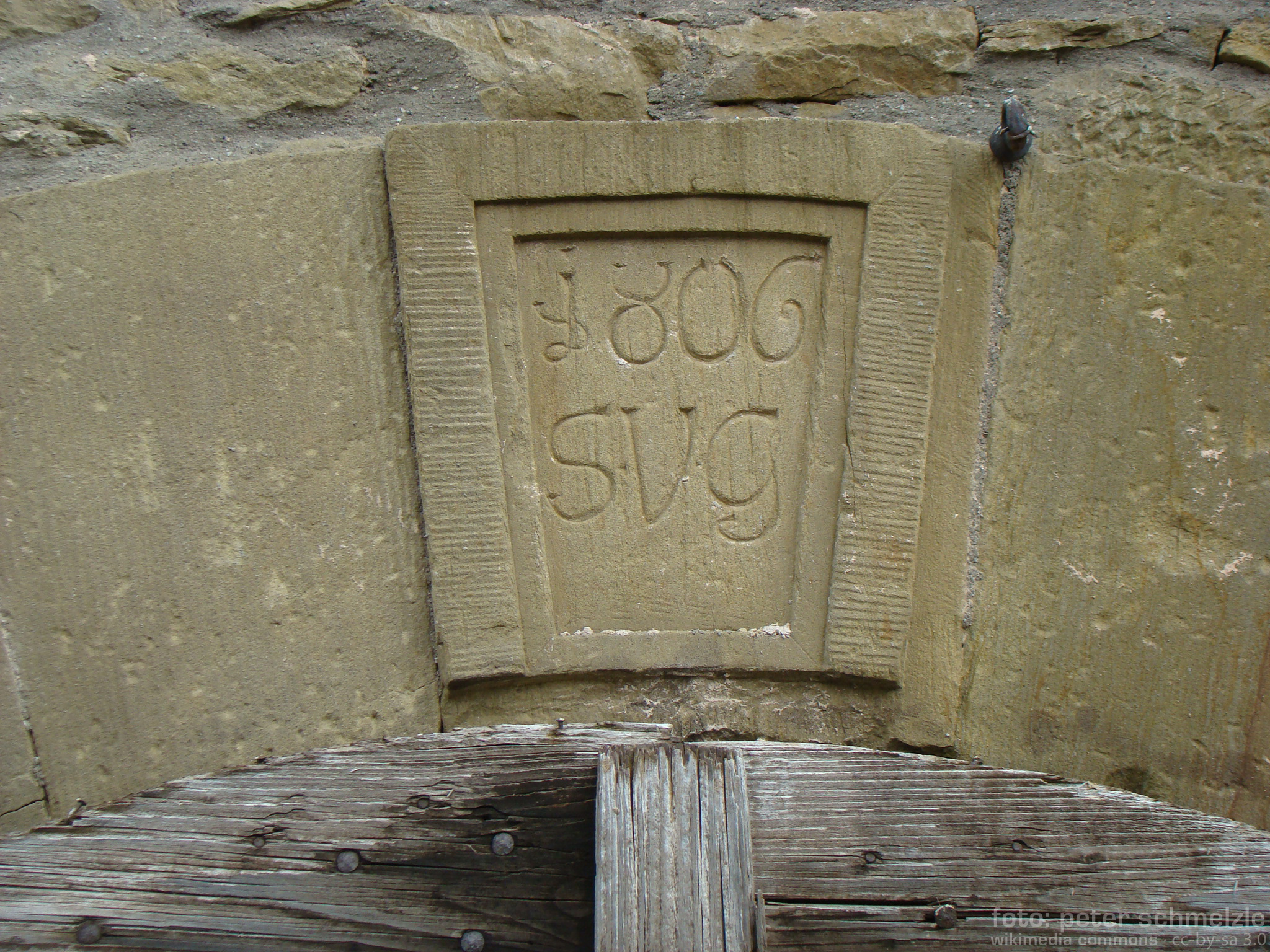 Inschriftenstein am Amtshaus in Treschklingen: SVG 1806 (Sigmund von Gemmingen, erbaut 1806).